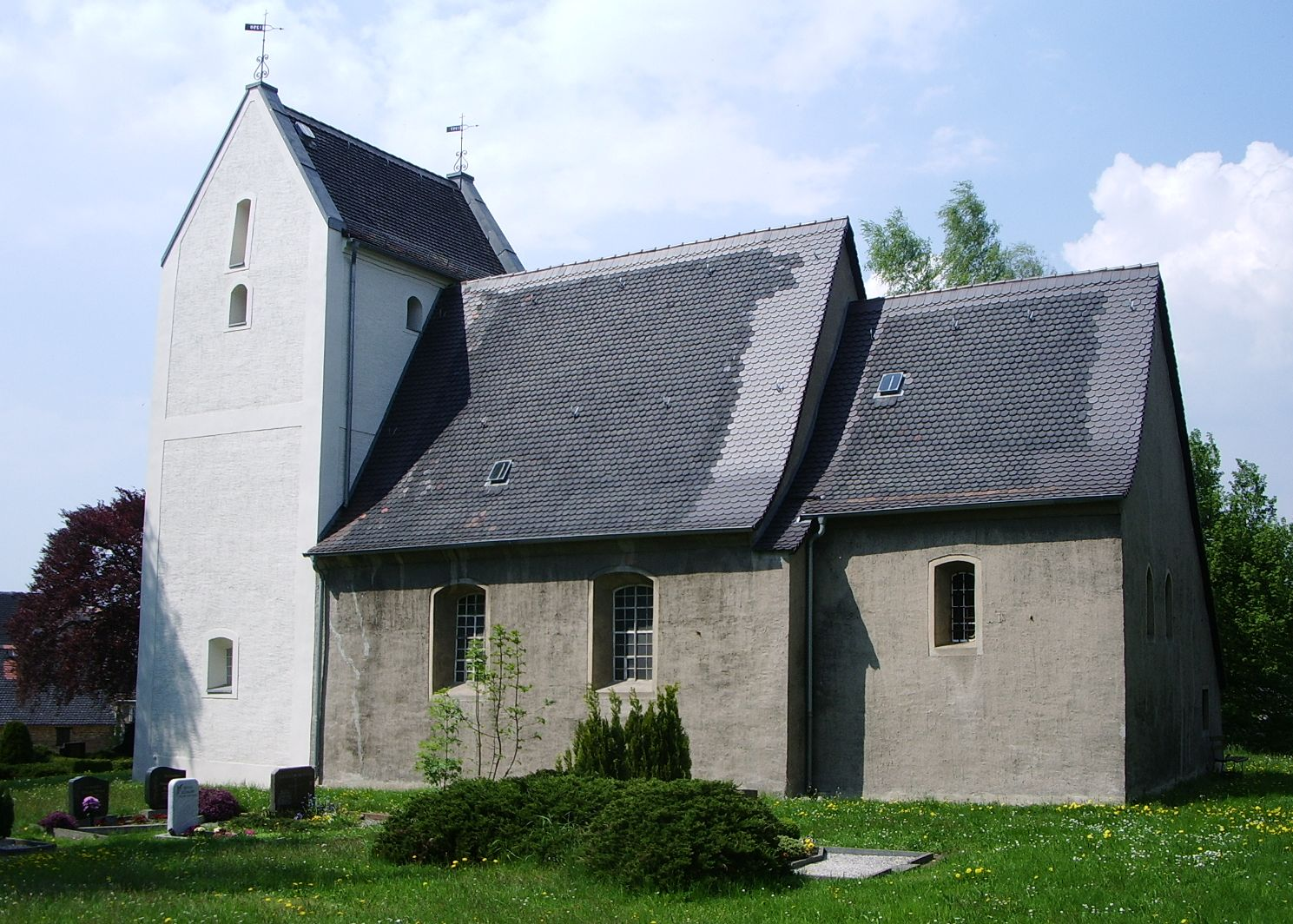 evang.-luth. Katharinenkirche zu Sehlis